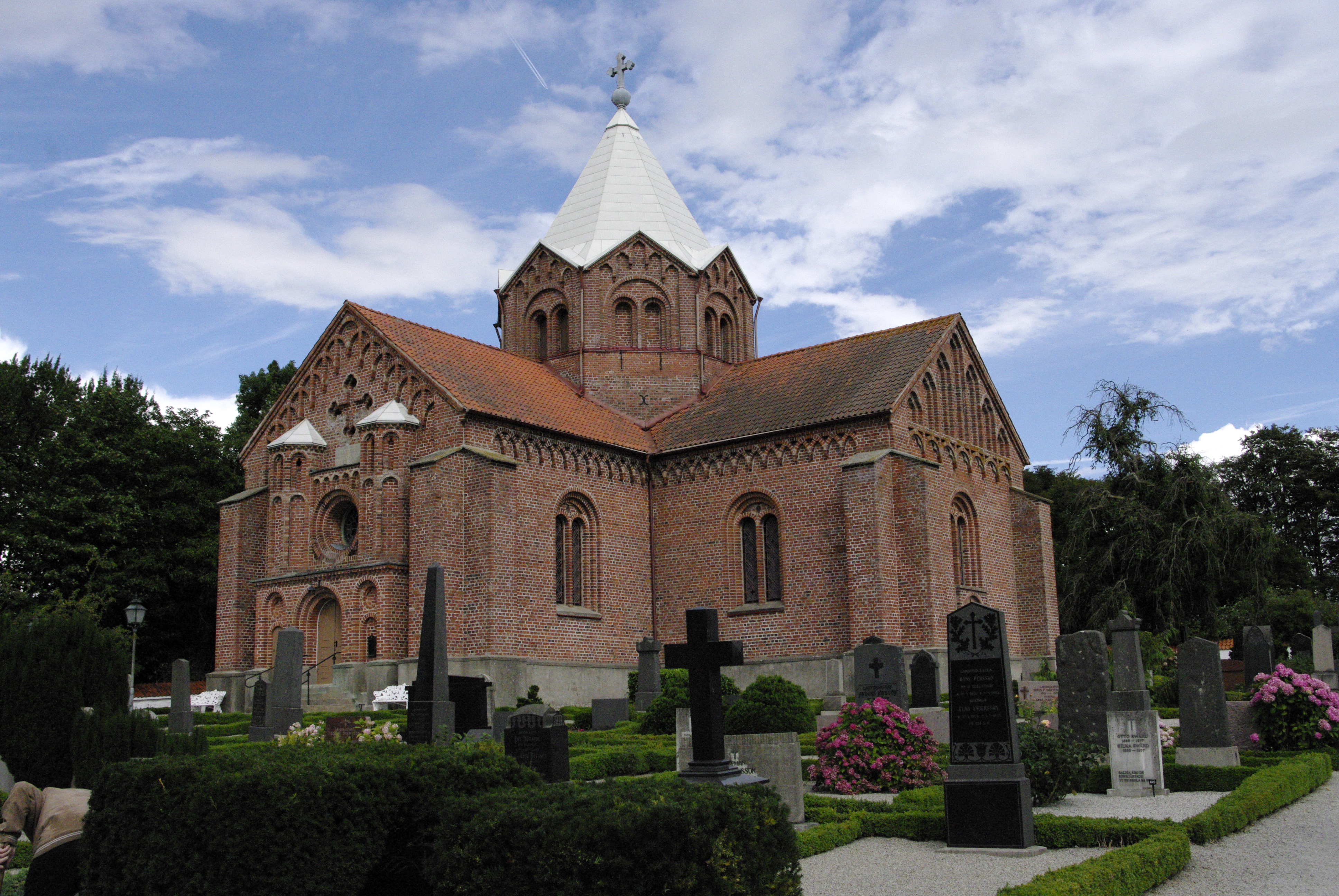 Tullstorps kyrka